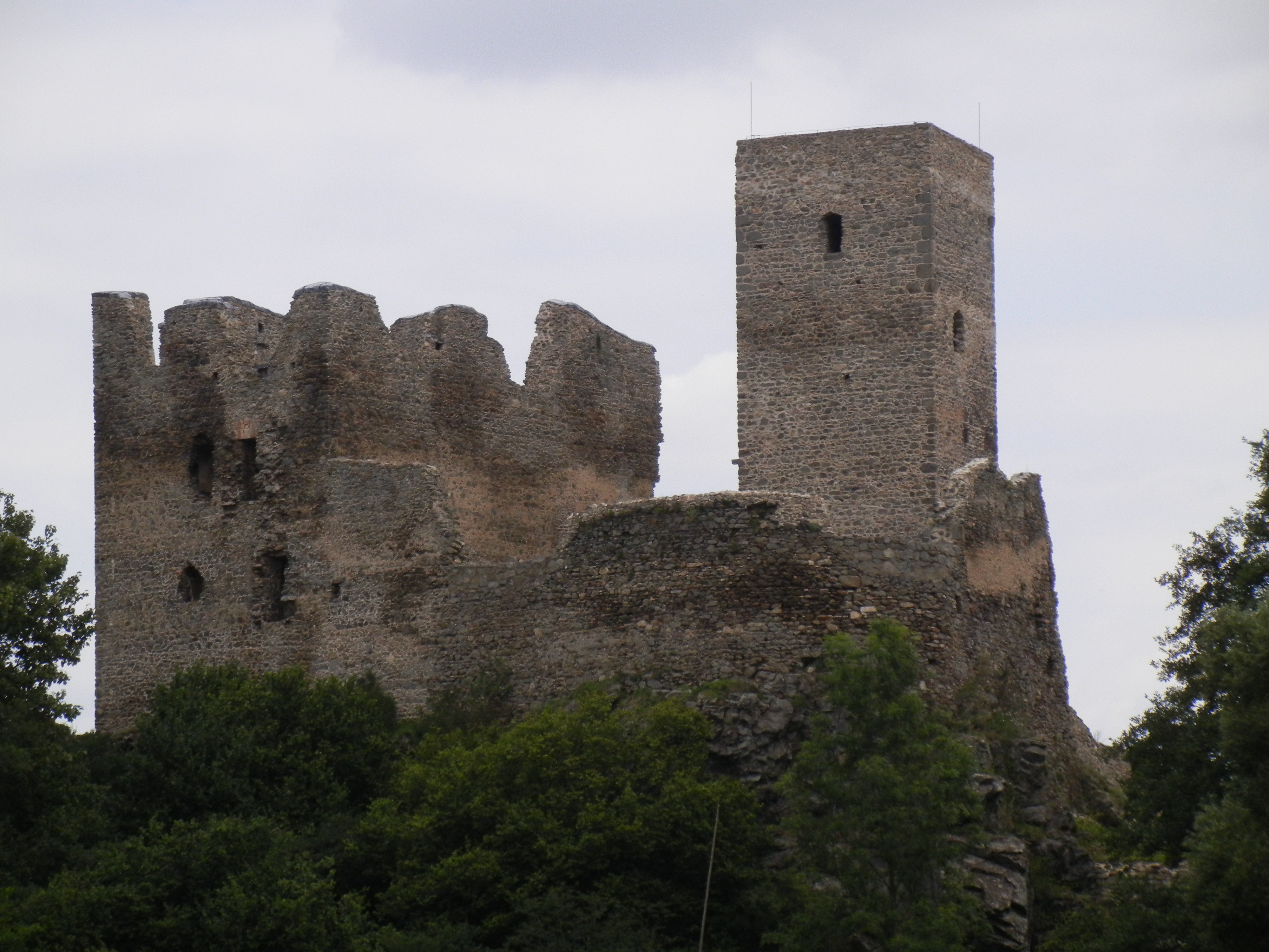 Hrad Rokštejn, zřícenina (Panská Lhota), Panská Lhota